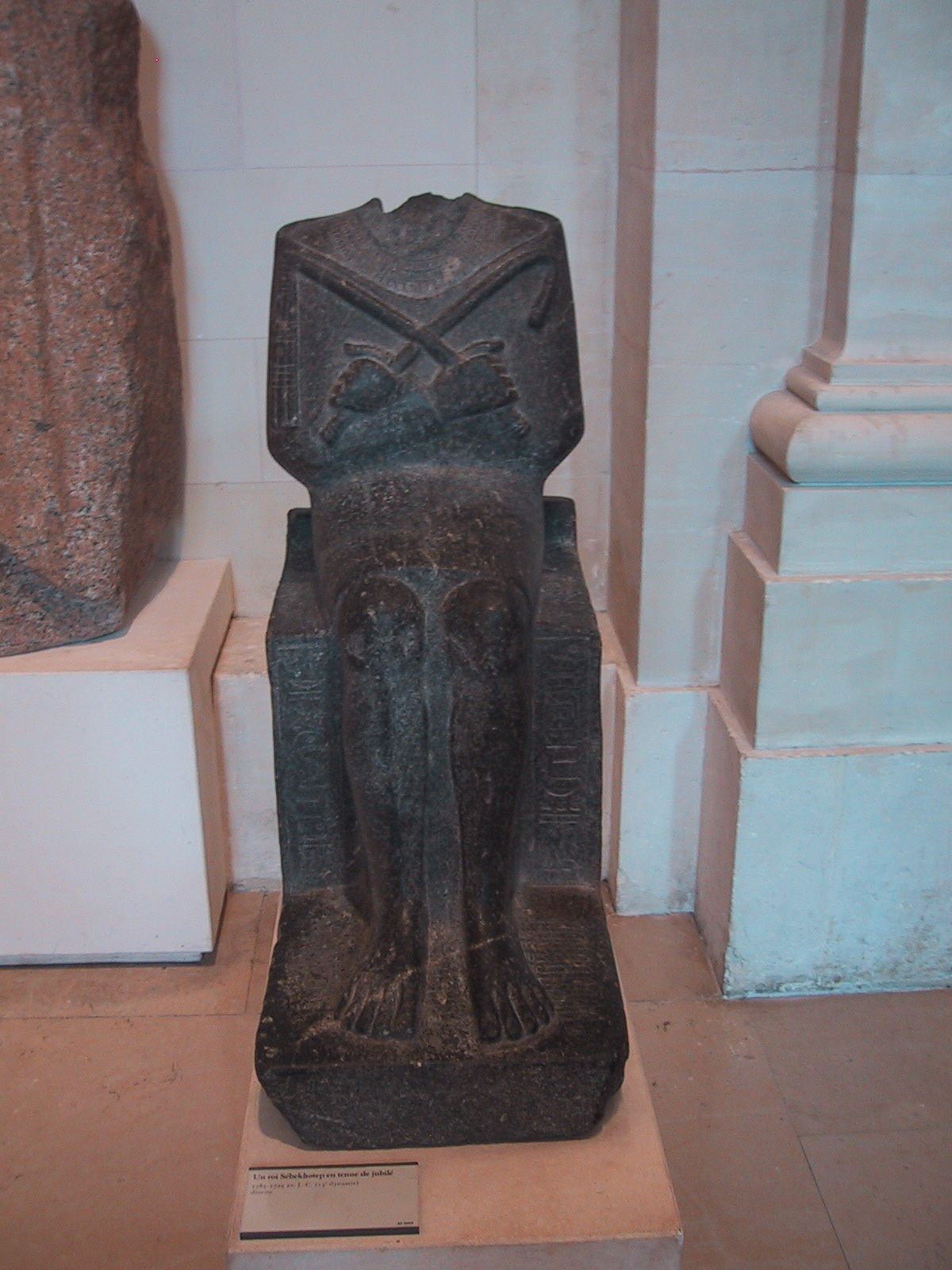 Un roi Sébekhotep en tenue de jubilé. 13e dynastie.